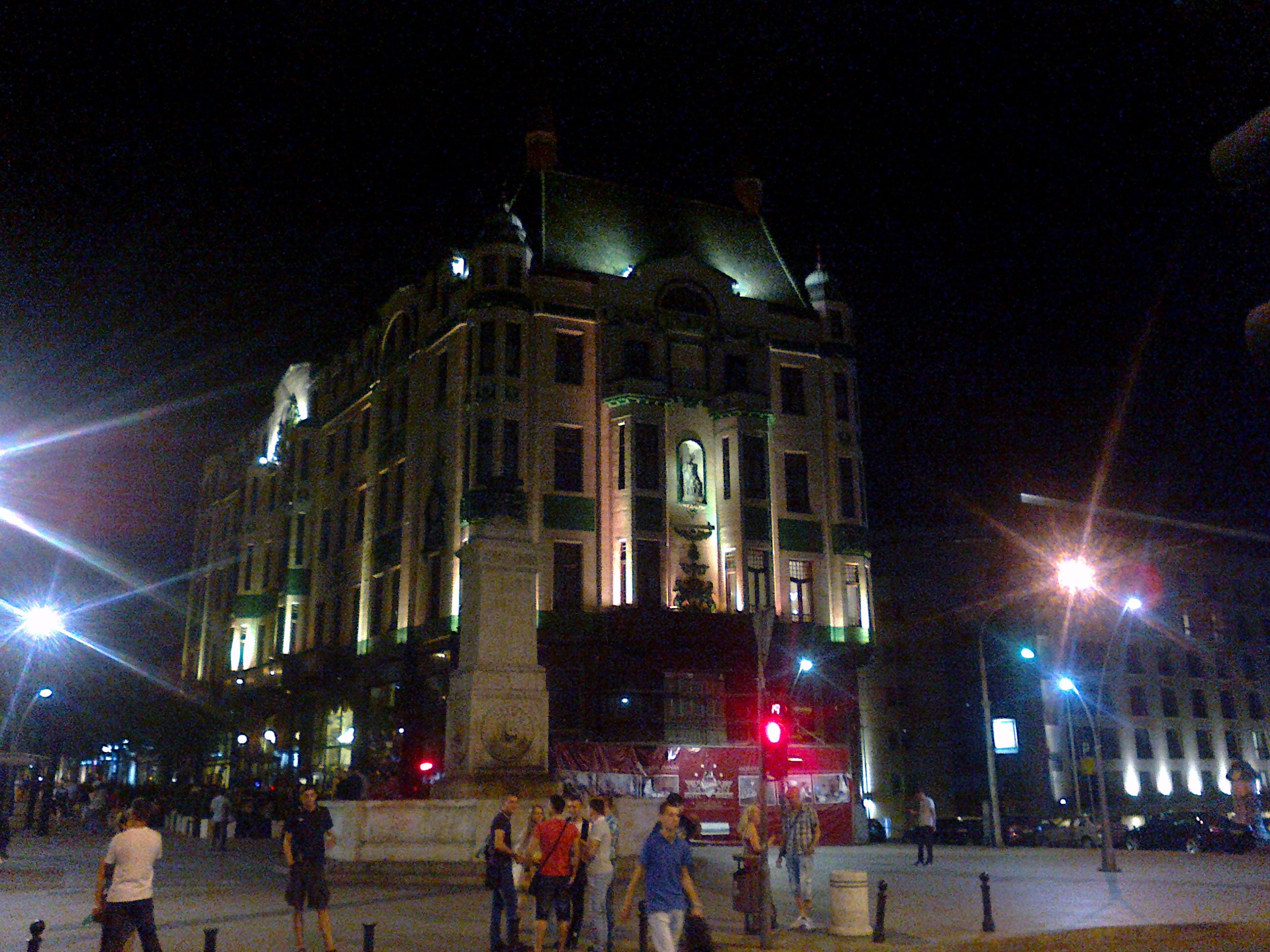 Хотел Москва ноћу, сликано 2. 5. 2012.